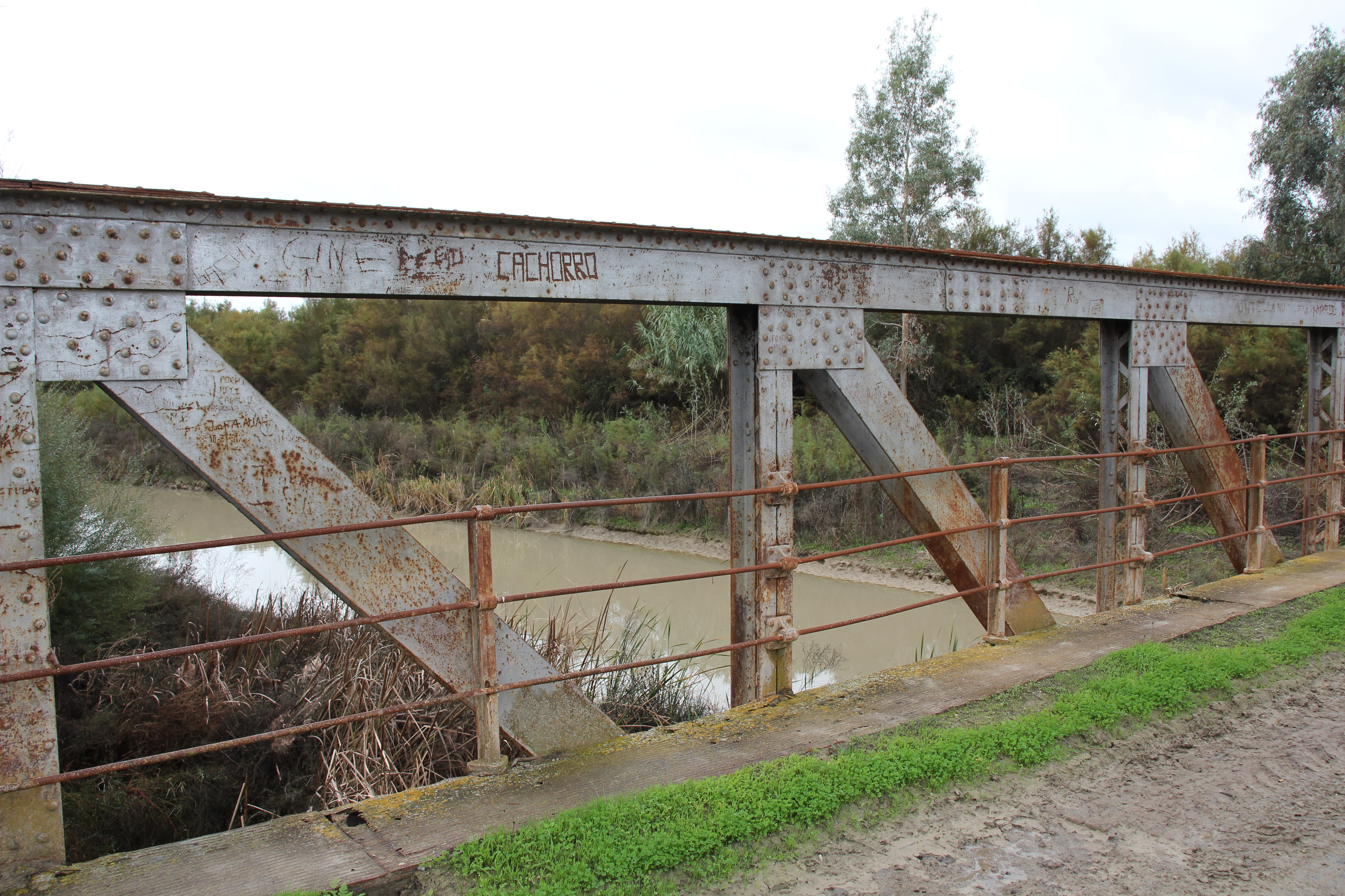 Sendero cola del embalse de Bornos (Andalucía, España)